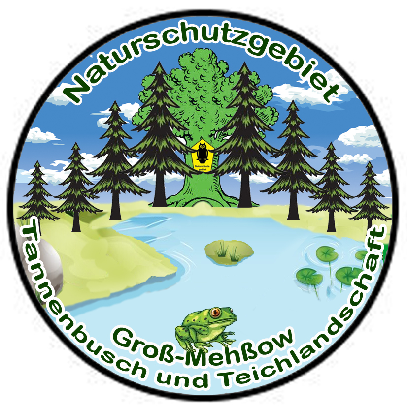 Logo Naturschutzgebiet Tannenbusch und Teichlandschaft Groß Mehßow. Eigene, private Entwicklung. Ich erkläre dieses Logo für Gemeinfrei - Nutzung in jeglicher Form möglich. Namensnennung nicht erforderlich.